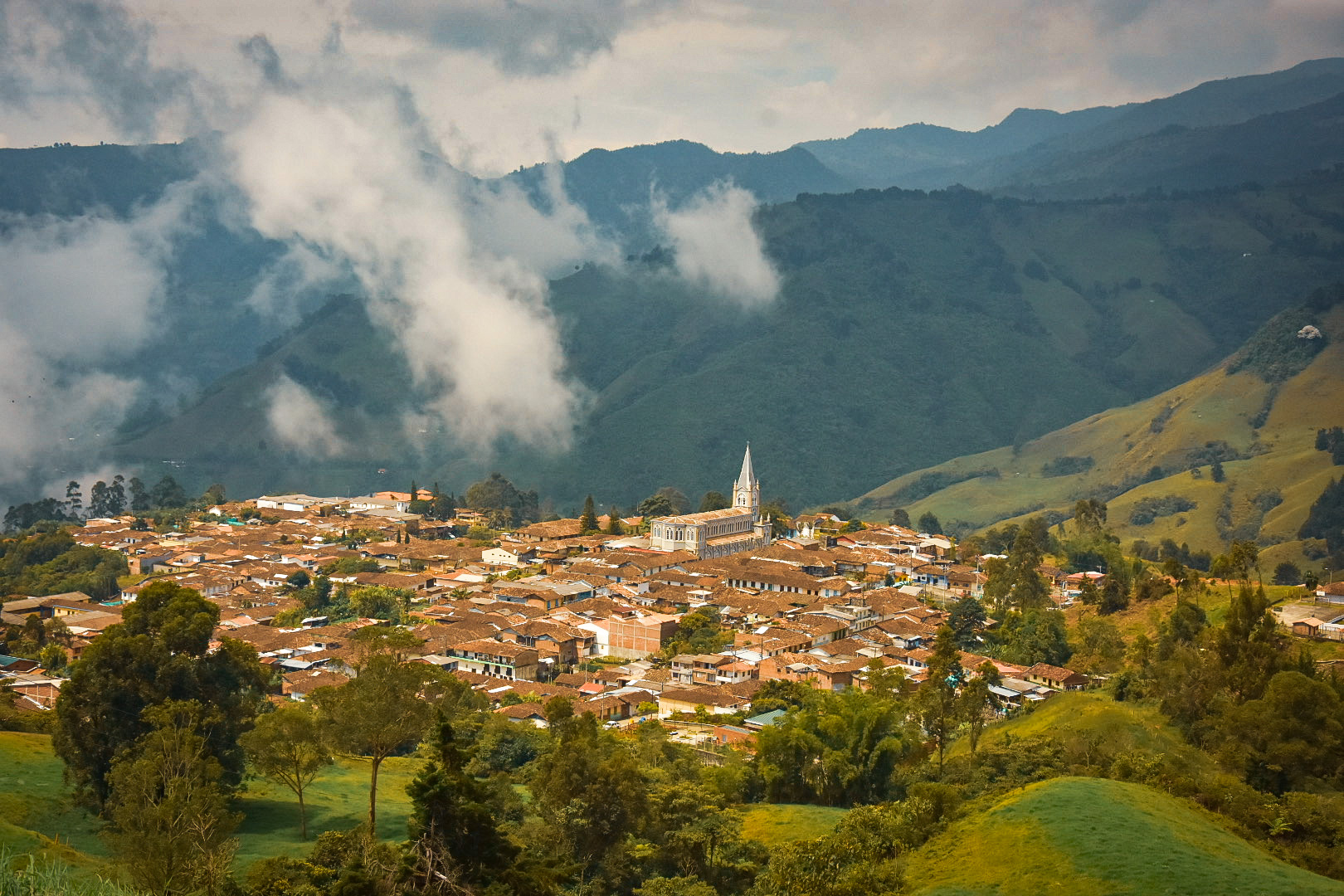 Panoramica de Caramanta